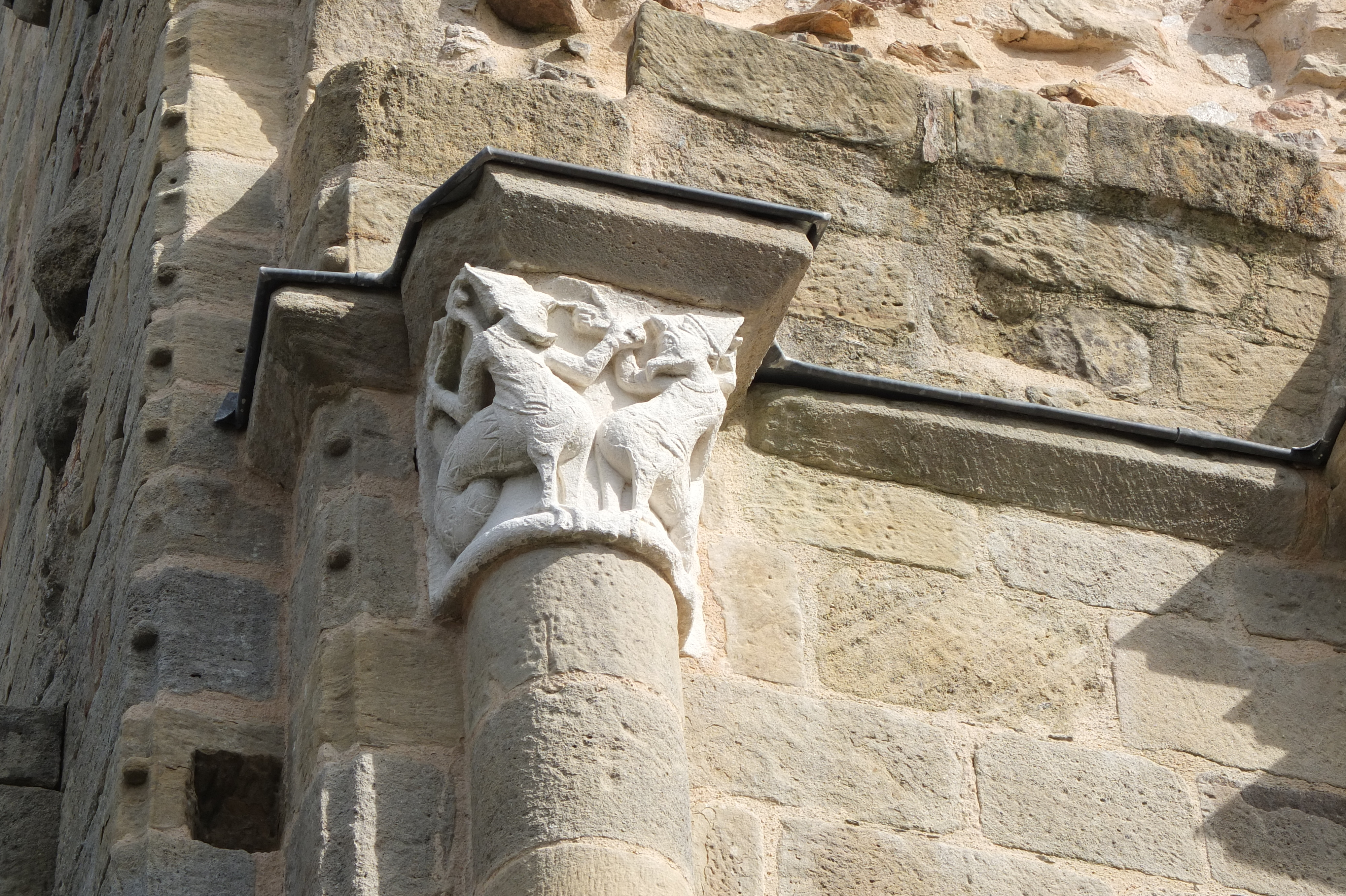 Église Notre-Dame d'Albignac, (ClasséInscrit, 19721972) This building is en partie classé, en partie inscrit au titre des Monuments Historiques. .